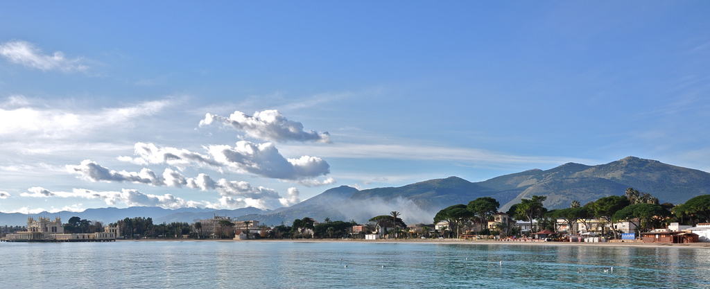 Golfo di Mondello - Palermo